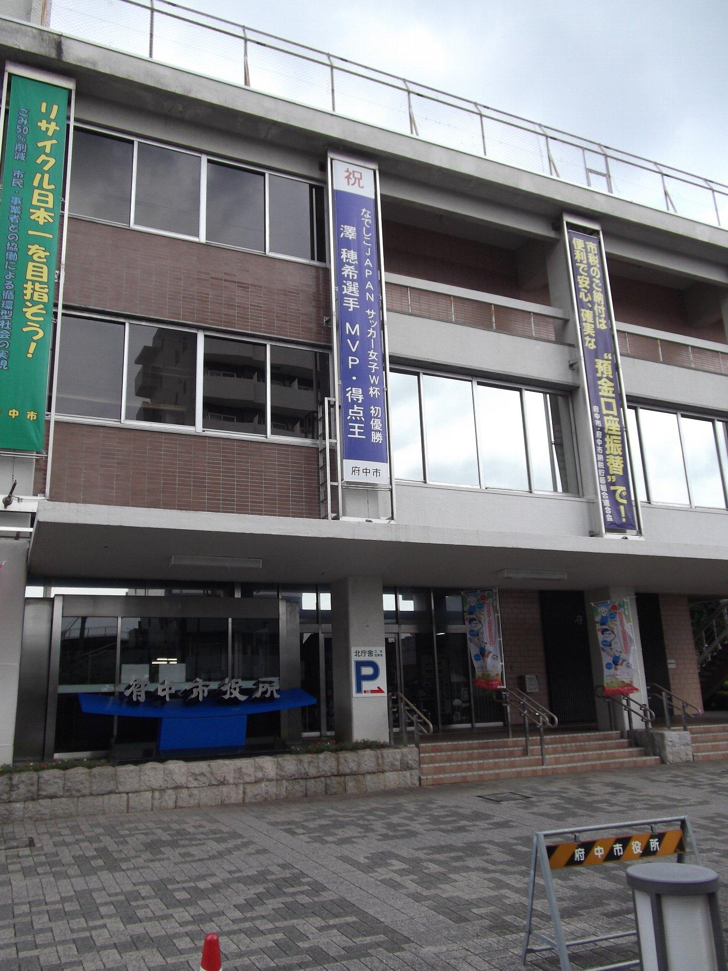 東京都府中市役所